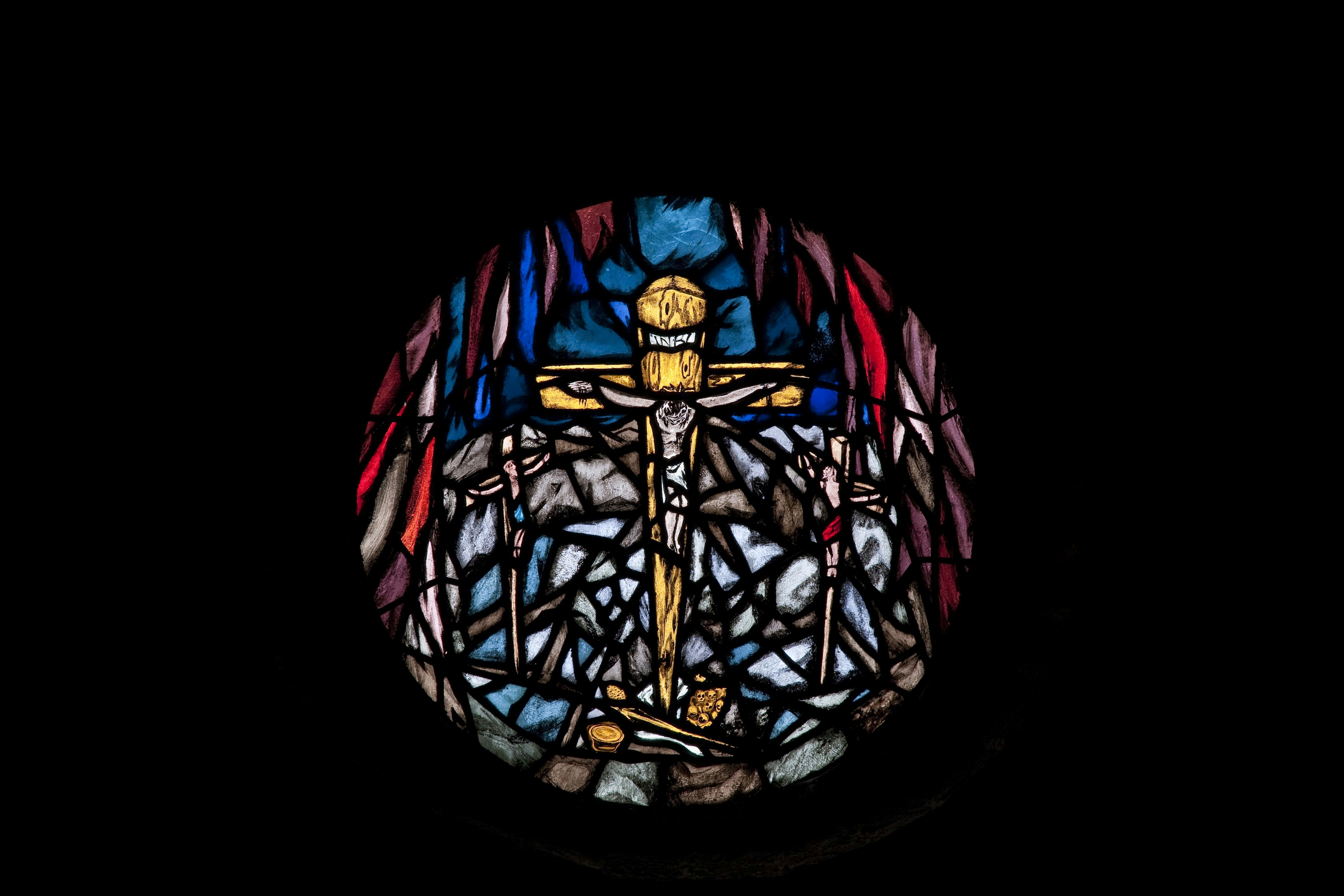 Nederlands Hervormde Kerk: Detail interieur, rond glas-in-loodraam in de zuidgevel